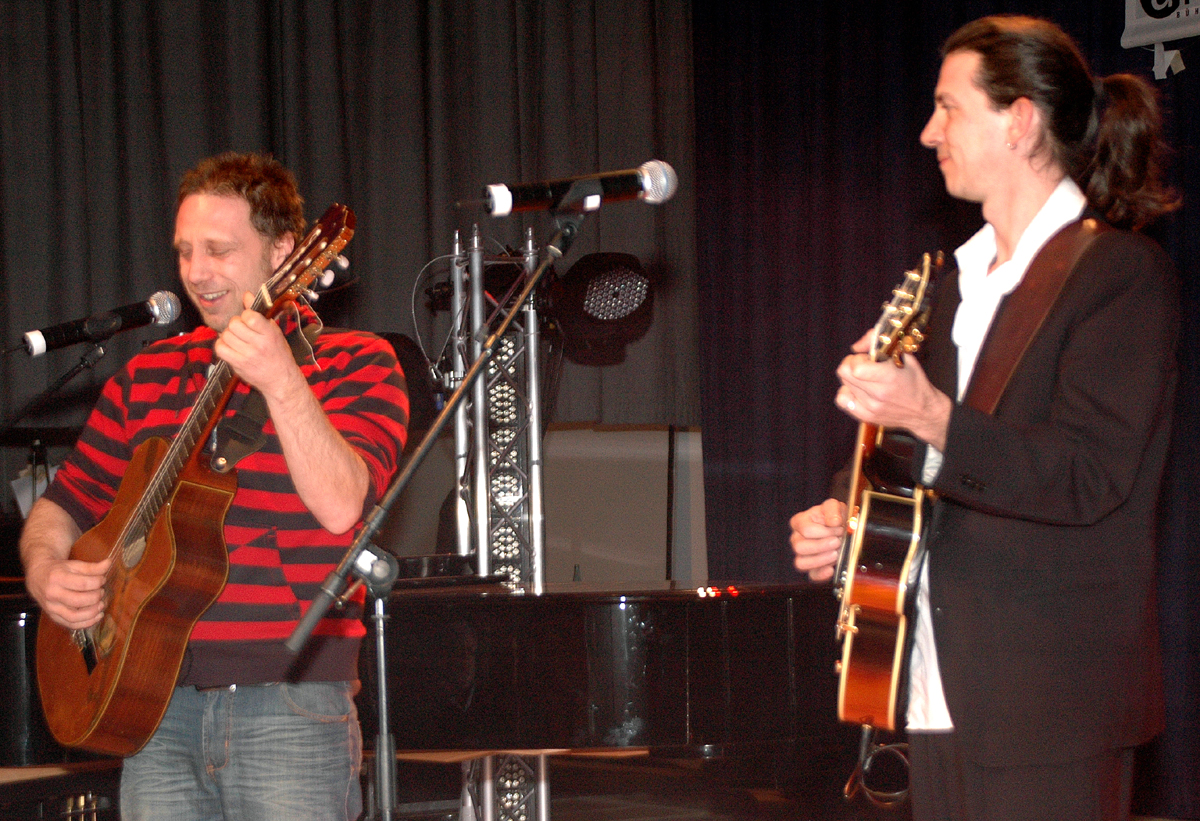 Les Derhosn, bestehend aus Michi Marchner (li.) und Martin Lidl in Freiburg, 2010